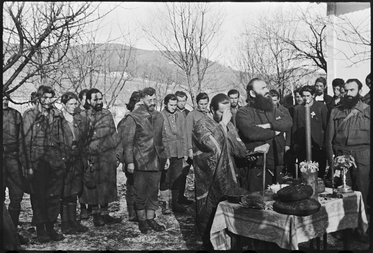 Драгољуб Михаиловић на својој крсној слави, Светом Николи, 19. децембра 1943. године у селу Горња Оровица на планини Бобији.